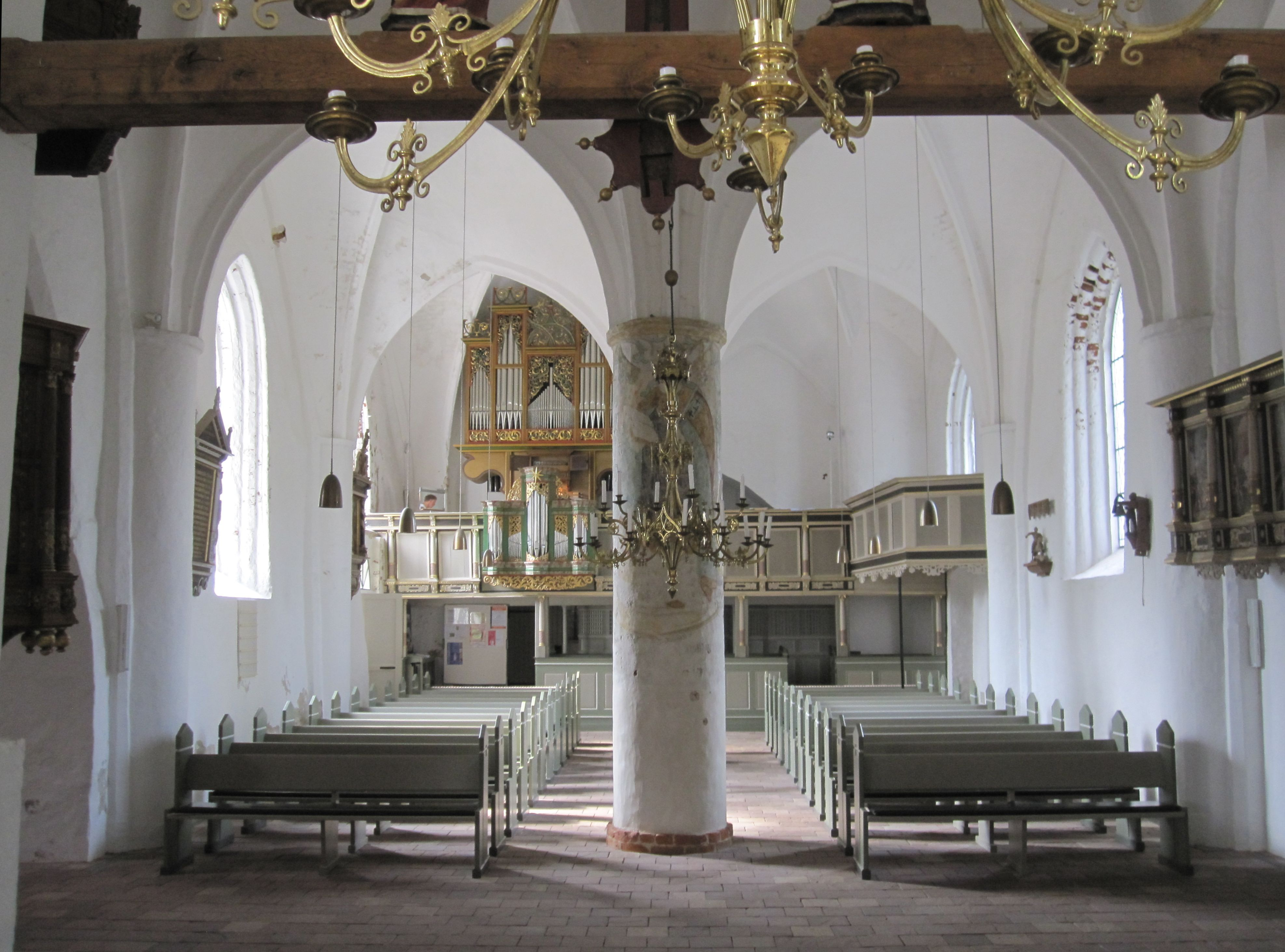 Die St.-Christians-/St.-Bartholomäus-Kirche steht in Gardings Ortsmitte auf einer elf Meter hohen Warft, der höchsten Erhebung Eiderstedts. Der Kirchturm ist noch heute der höchste Punkt Eiderstedts und diente lange als Seezeichen. Mit ihrem gotischen Orgelprospekt von 1512 hat die Kirche den ältesten Orgelprospekt Nordeuropas. Das ehemals gotische hohe, spitze Dach der Kirche wurde bei einer Renovierung 1854 durch ein besser in die Landschaft passendes und vor allem weniger windanfälliges, niedrigeres Dach ersetzt . Die Kirche geht auf die 1117 errichtete einschiffige, kreuzförmige Backsteinkirche St. Christian zurück. Sie war ursprünglich den Heiligen Maria Magdalena, Christian und Bartholomäus geweiht. Die Kirche wurde im Zeitraum von 1483 bis 1488 zu einer zweischiffigen gotischen Hallenkirche umgebaut, wobei ein Schiff den männlichen und ein Schiff den weiblichen Gottesdienstbesuchern diente. Nachdem Hermann Tast 1524 noch auf dem Marktplatz die erste Reformationspredigt Eiderstedts gehalten hatte, setzte sich die Reformation durch Christian III. von Dänemark bis 1527 in der Region durch. Sichtbar ist dies in der Kirche an der zerschlagenen Altarplatte mit der Aufschrift „Hic sunt reliquiae reconditae“ (Hier sind die Reliquien aufbewahrt). 1563 baute die Gemeinde eine Kanzel. Sie ist die älteste Kanzel Eiderstedts und wurde mit ihrem sechseckigen Grundriss zum Vorbild fast aller anderen Kanzeln im Lande. Blick nach Westen zu Emporen und Orgel.